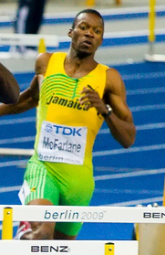 Danny McFarlane beim Finallauf über 400 Meter Hürden bei den Weltmeisterschaften 2009 in Berlin